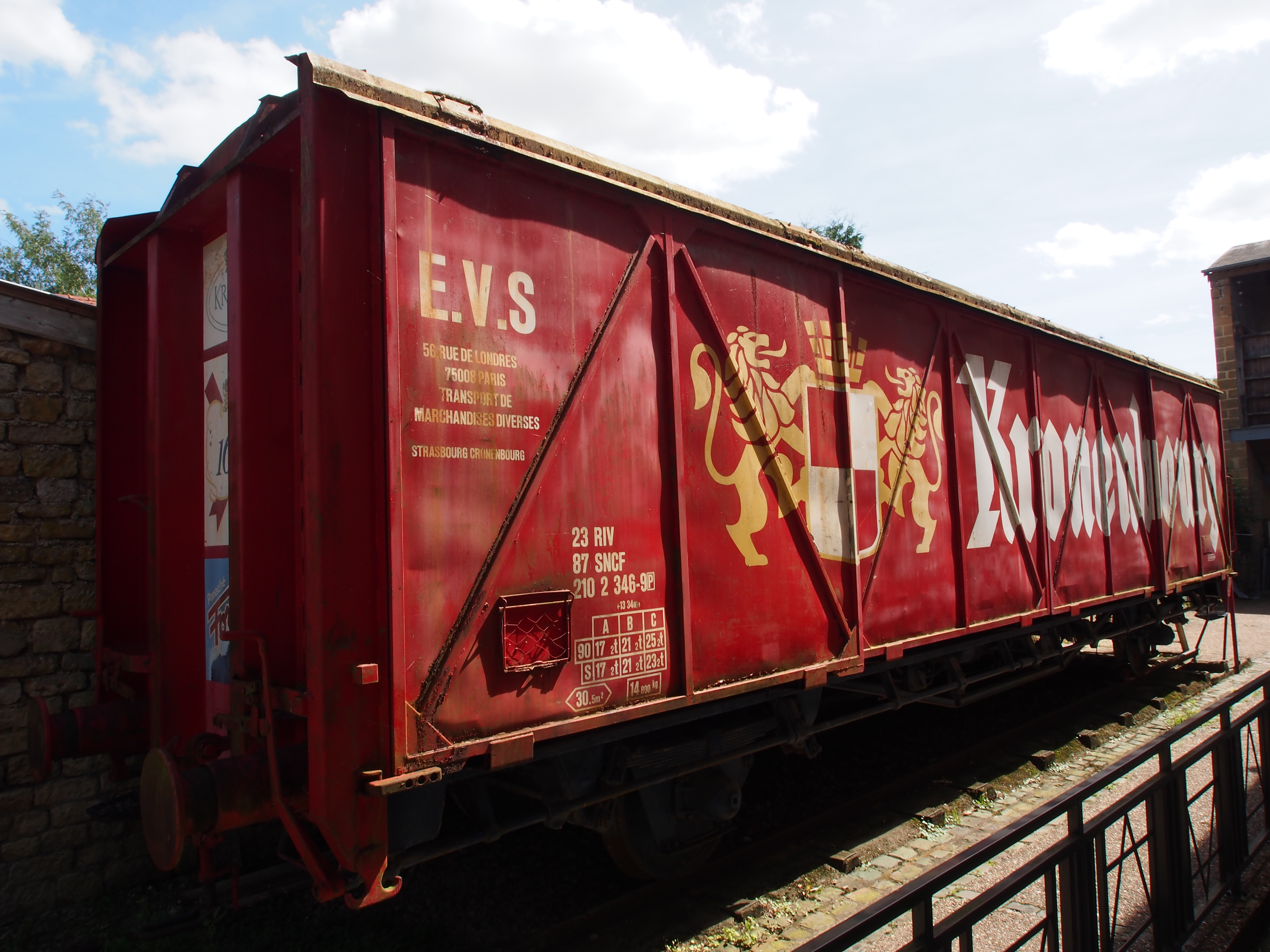 Kronenbourg train wagon.